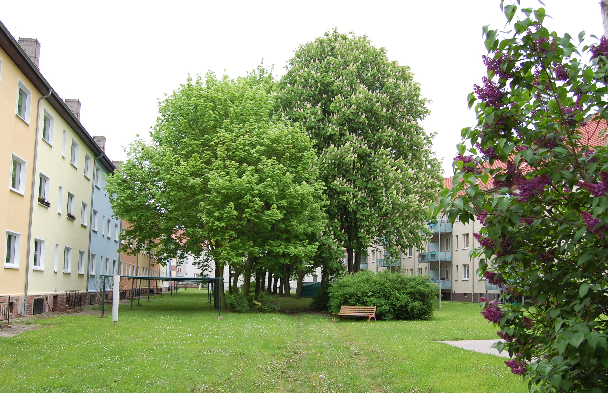 Innenhof zwischen den Straßen Am Klosterfeld und Mühlinger Straße in Magdeburg-Fermersleben